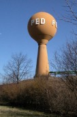 Château d'eau sur le P.E.D.